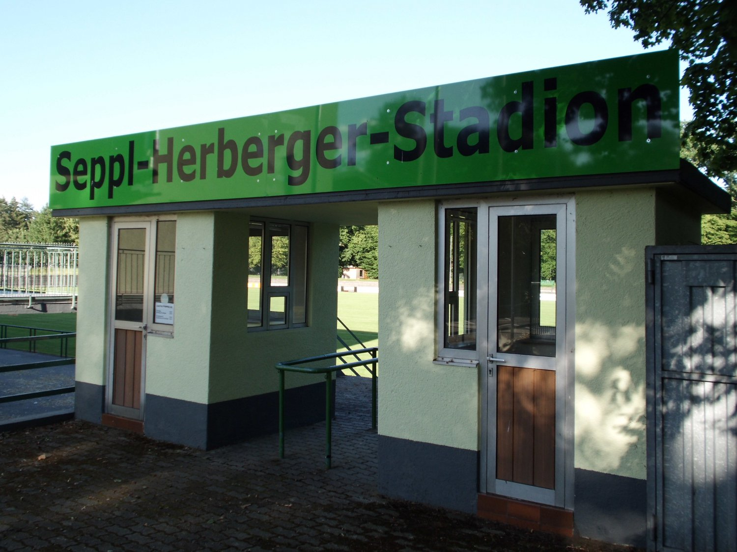 Eingang des Sepp-Herberger-Stadions in Wiesental, Waghäusel